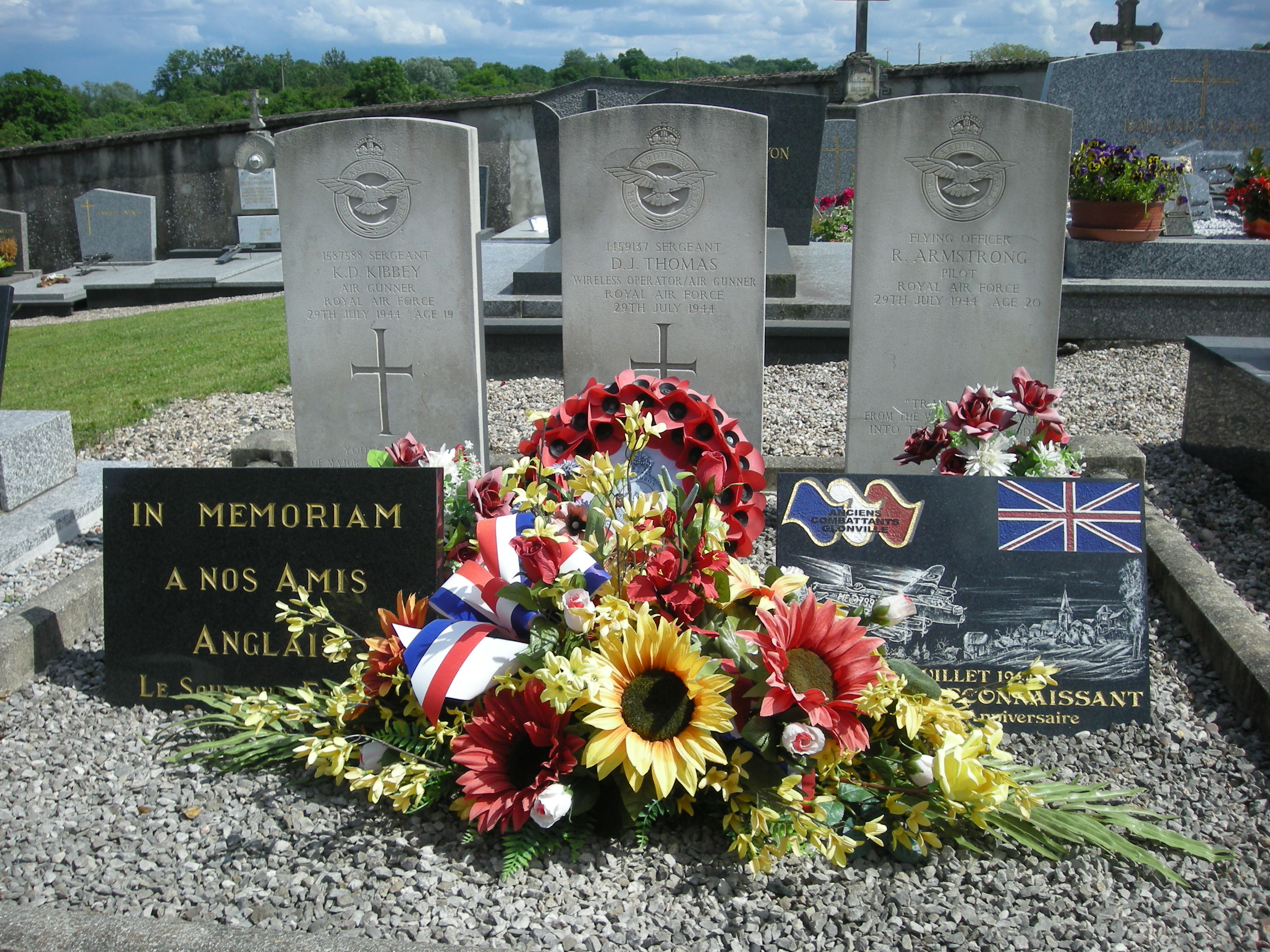 Tombes de 3 soldats britanniques de la Royal Air Force au cimetière de Glonville (Meurthe-et-Moselle) : Sergeant K. D. Kibbey (Air Gunner) ; Sergeant D. J. Thomas (Wireless Operator/Air Gunner) ; Flying Officer : R. Armstrong (Pilot), tombés le 29 juillet 1944 [1]